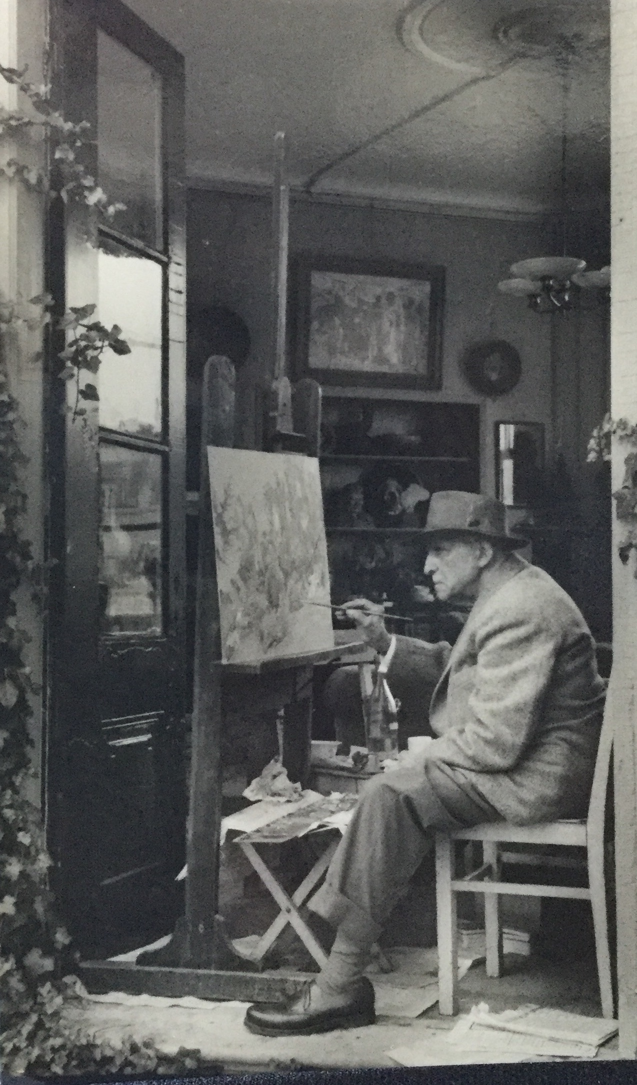 De Schilder Raoul Martinez aan het werk ca 1955